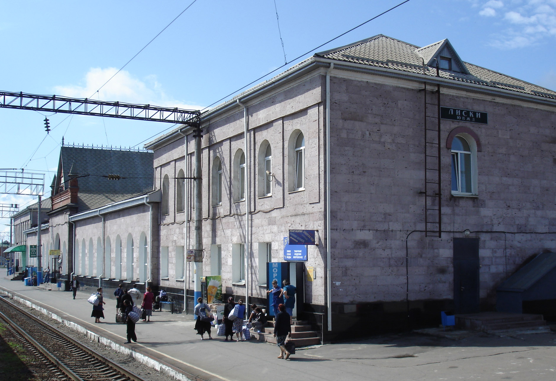 Здание вокзала ЖД-станции Лиски